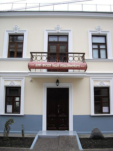 Отдел Крымского республиканского краеведческого музея «Дом-музей Ильи Сельвинского»